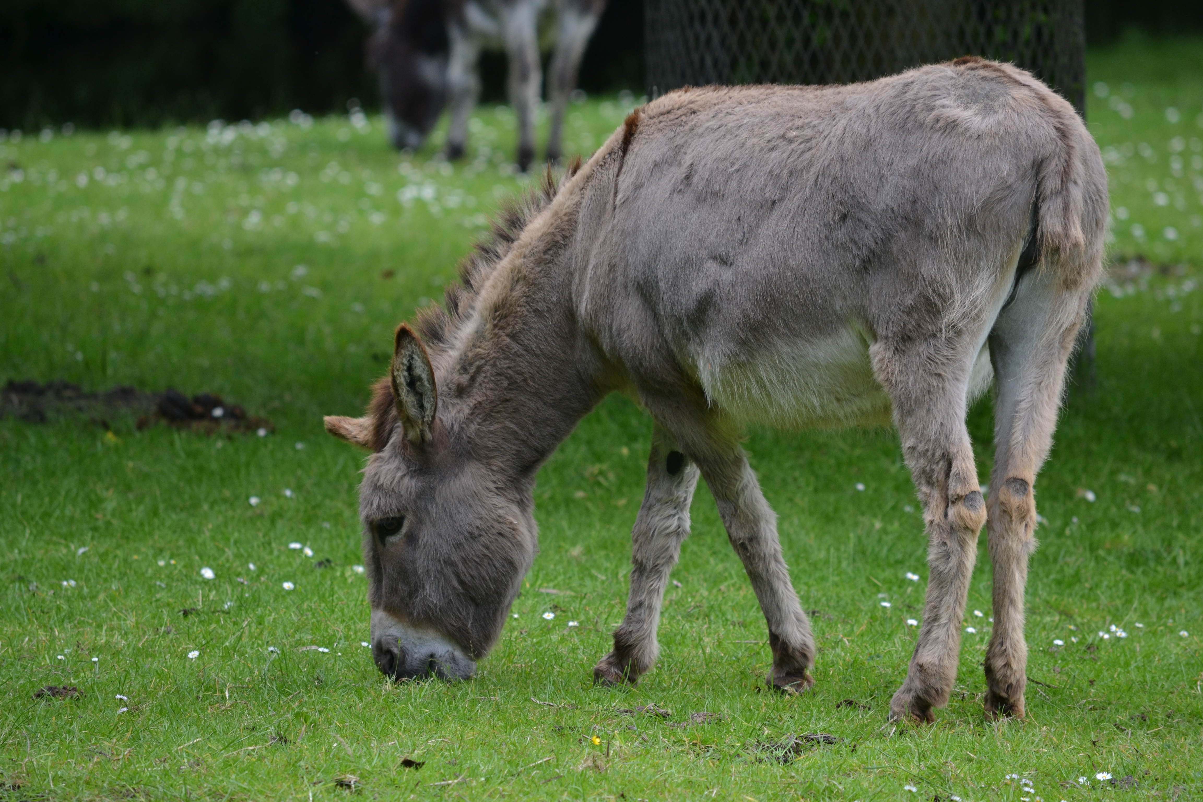 Deze foto is gemaakt tijdens een bezoek aan kinderboerderij De Molenwei (Rotterdam). This picture was taken during a visit to the petting zoo De Molenwei (Rotterdam).